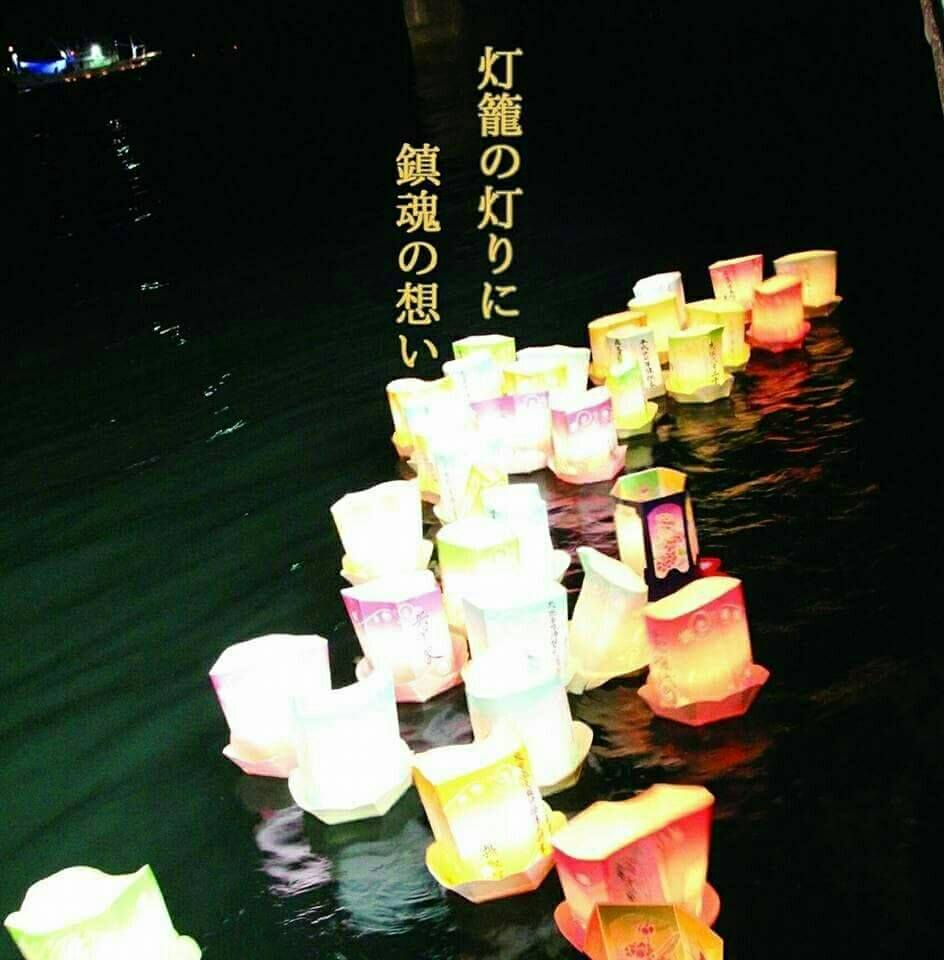 灯籠の灯りに鎮魂の想い/ おいなっさん | MCS-mobius cosmic sounds- ジャケット画像